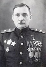 Николай Иванович Кирюхин (1896 — 1953) — советский военачальник